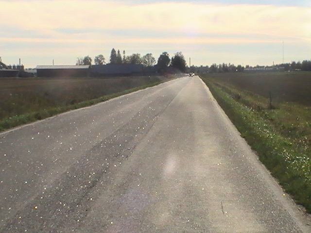 Yhdystie 2044 Säkylän ja Kankaanpään välillä